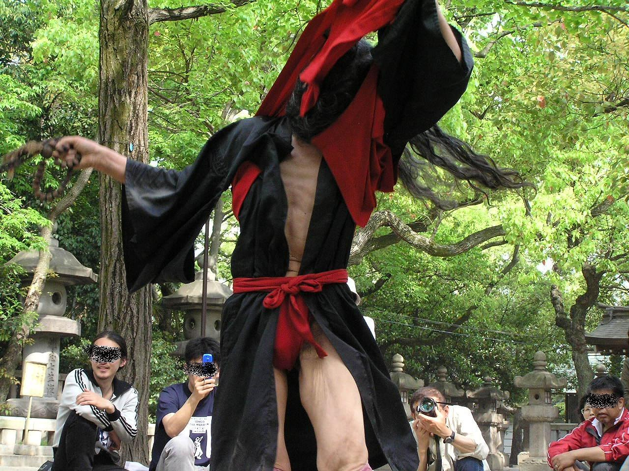 念仏じょんがら ギリヤーク尼ヶ崎 神戸公演 （湊川神社）